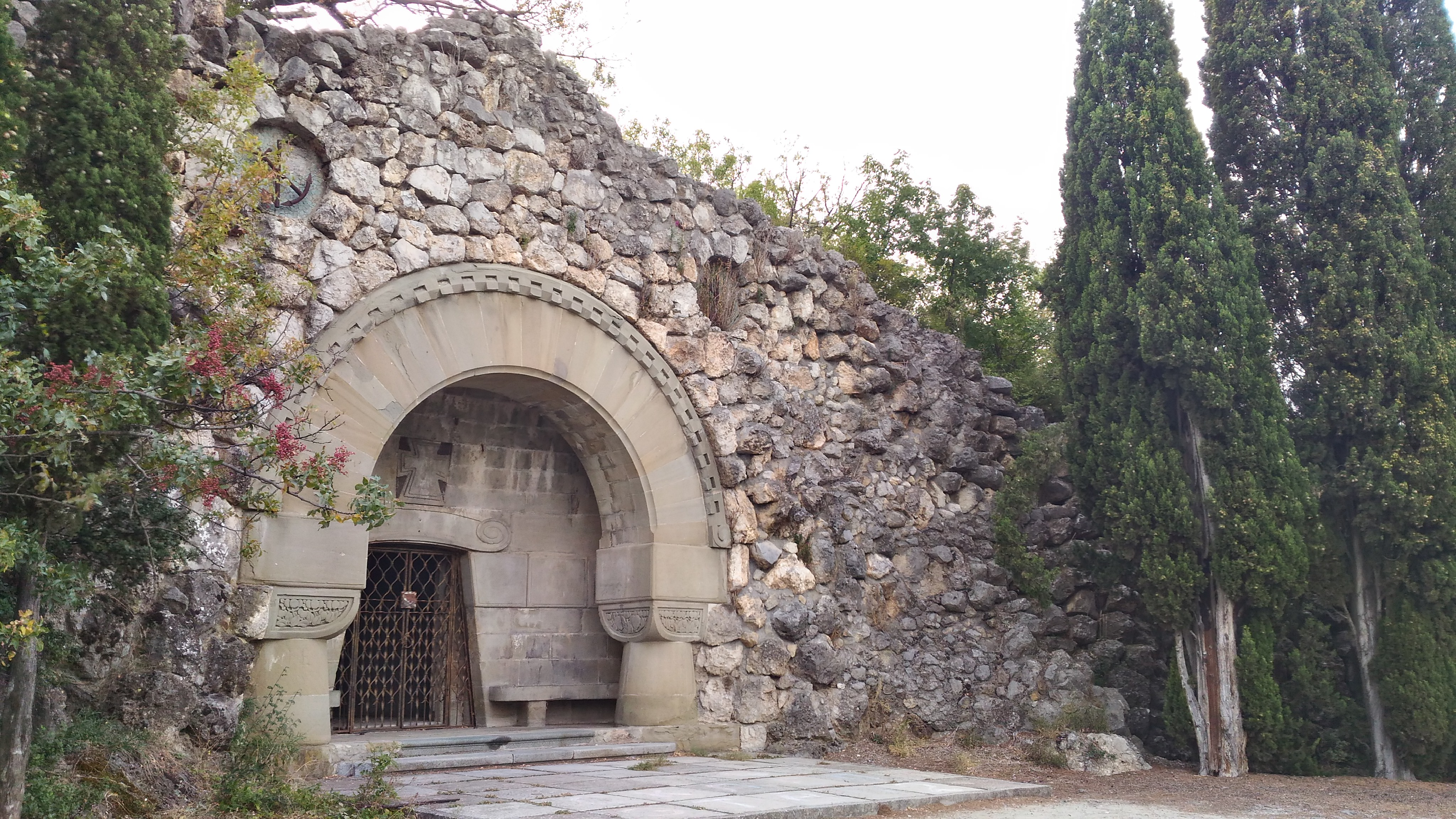 Склеп В.Березина: МДЦ «Артек», Гурзуф, Ялта, Крым This object is located on the Crimean Peninsula and recognized as cultural heritage by Russia under the monument ID: 8232029000. The legal status of the Crimean region is currently disputed.